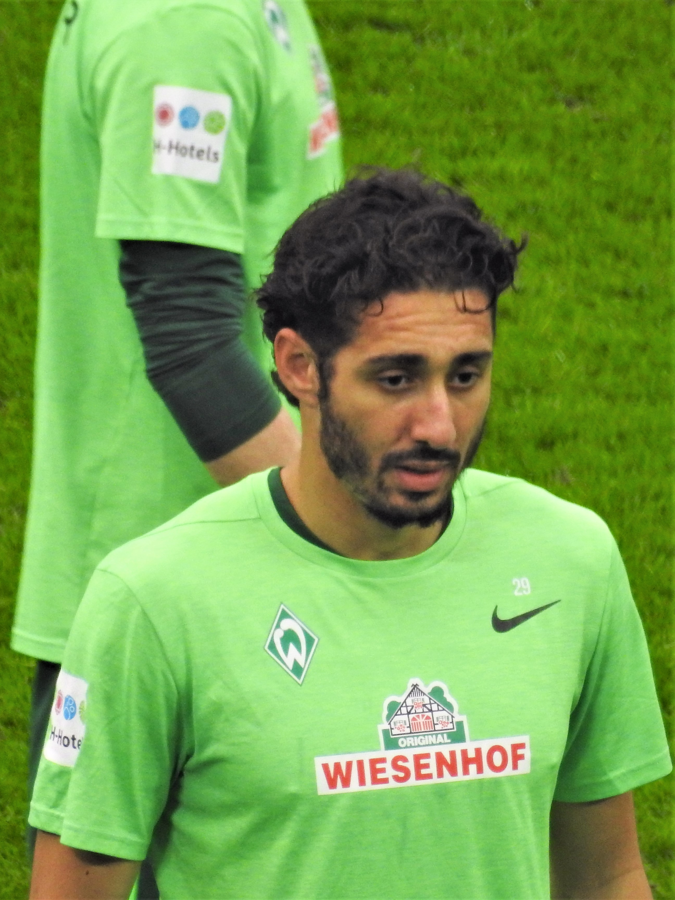 Ishak Belfodil Werder Bremen